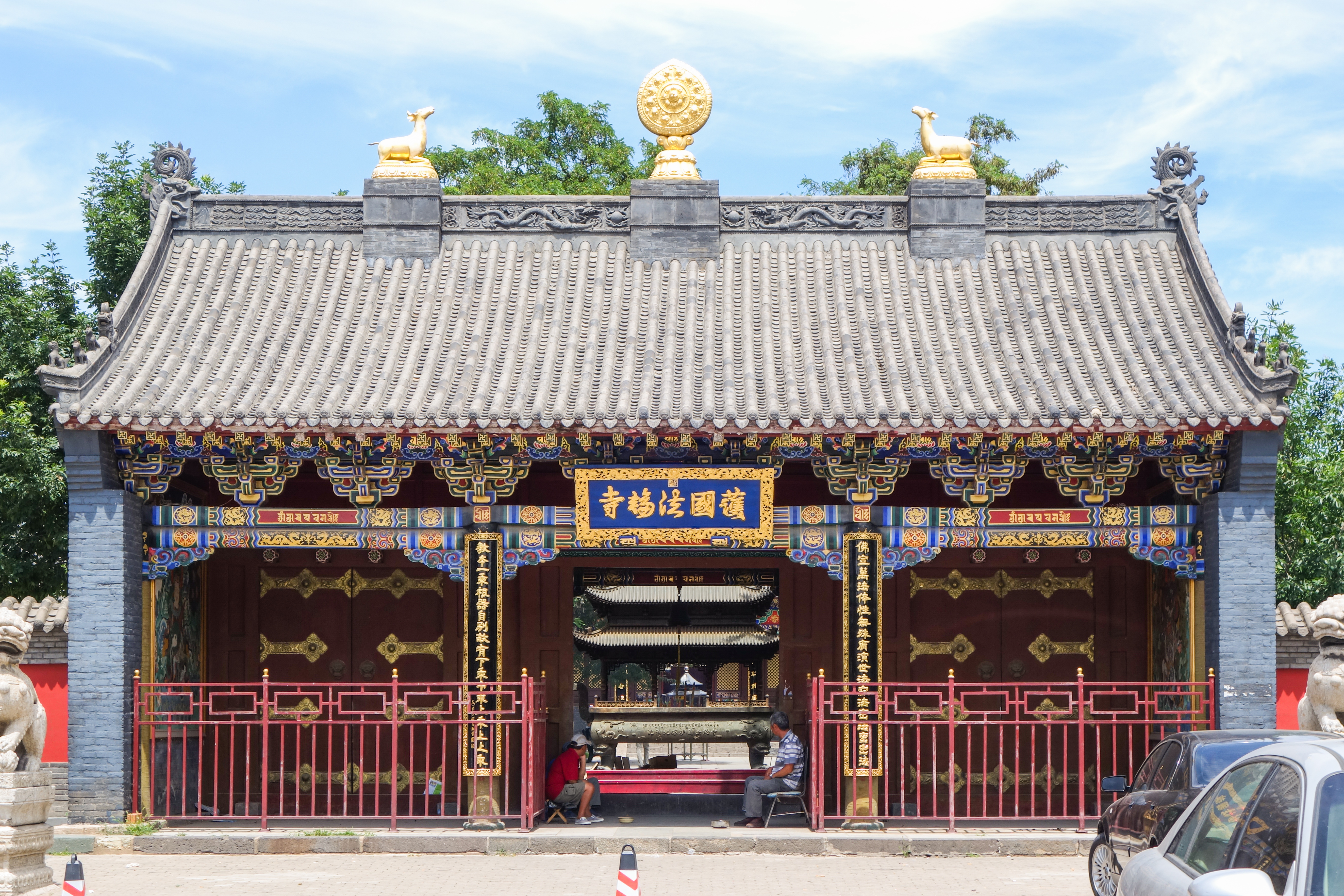 中文（中国大陆）: 沈阳护国法轮寺